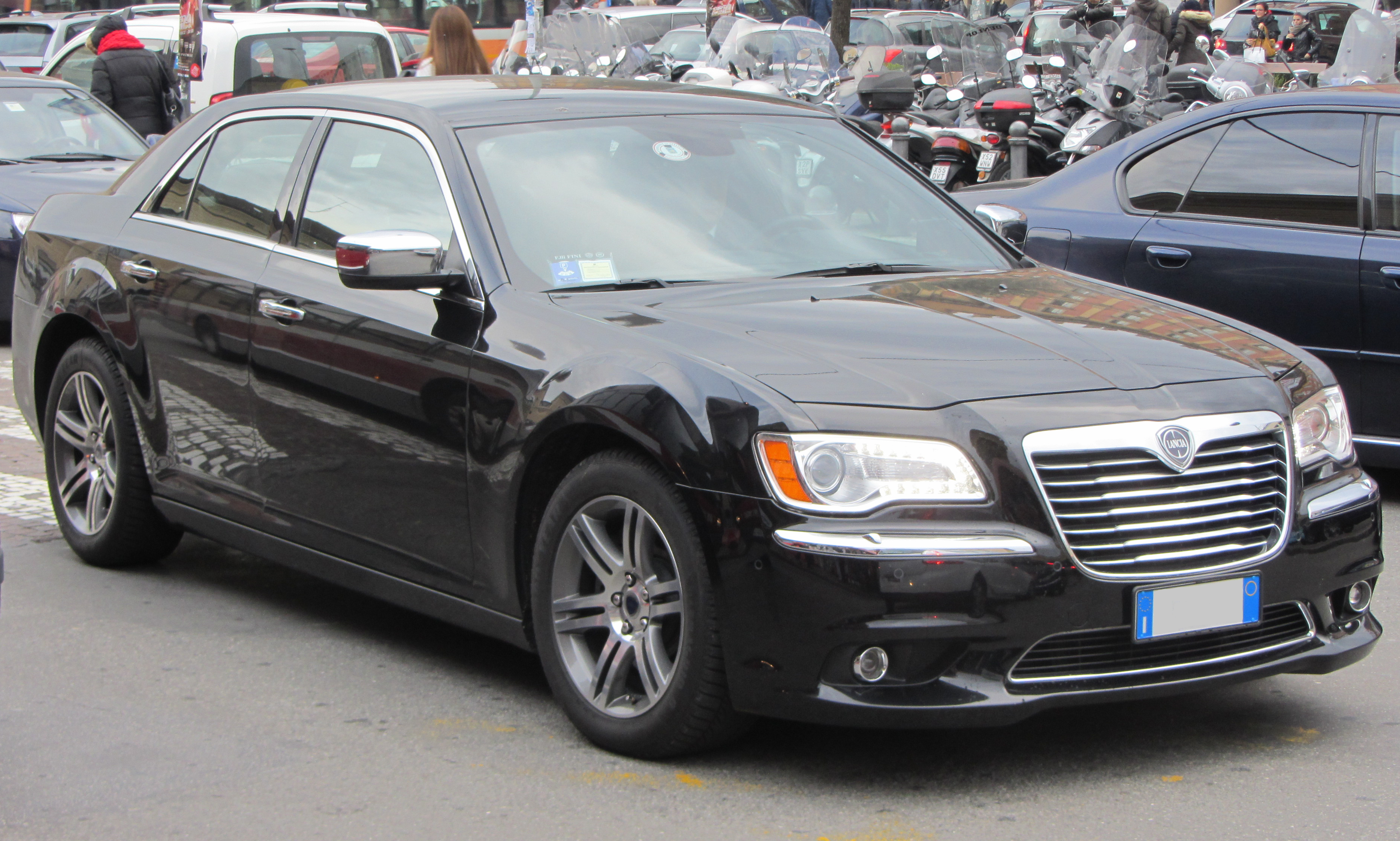 Una Lancia thema del 2011 a Bologna